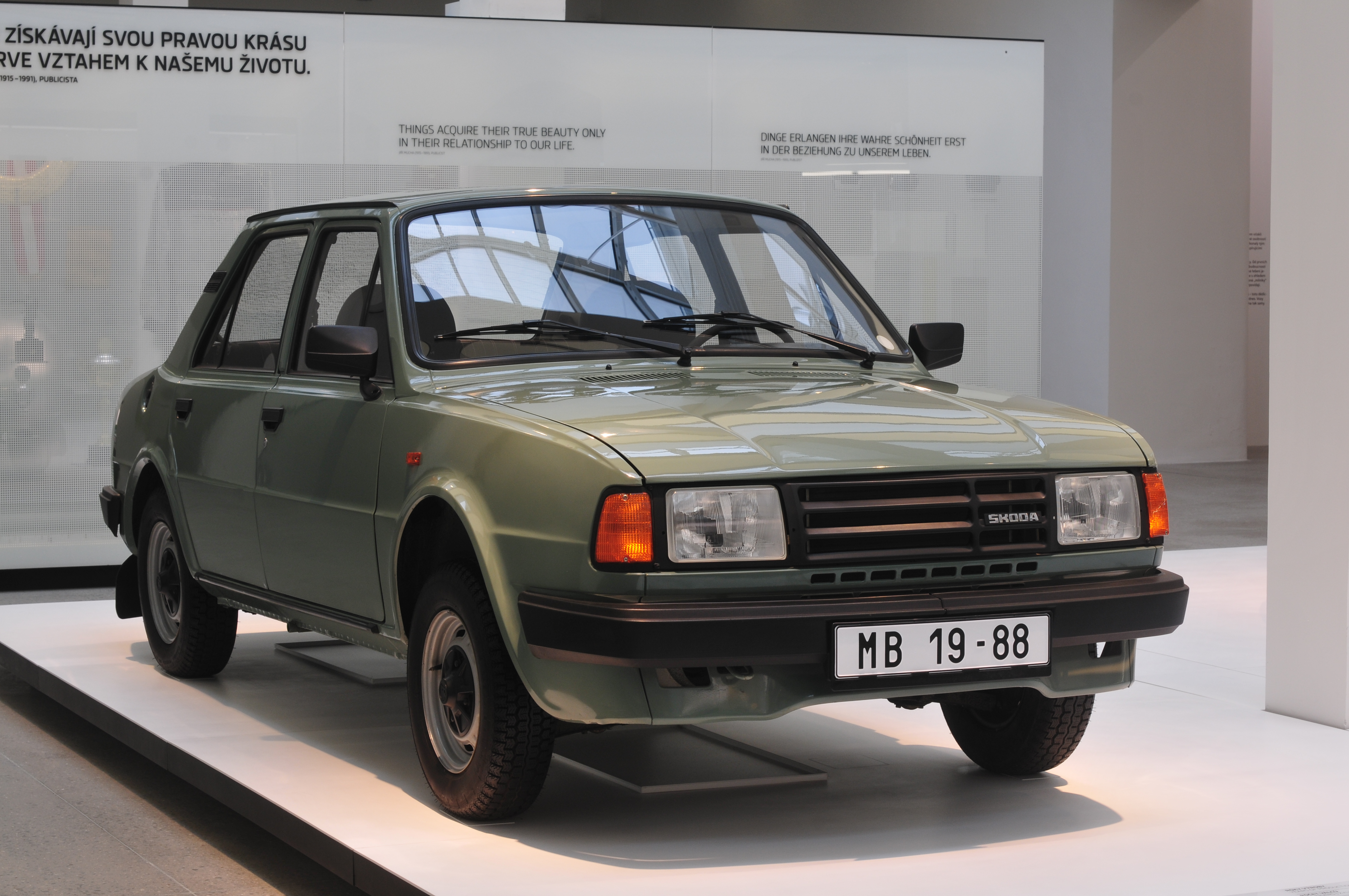 Fototermin Škoda Museum Mladá Boleslav 2013 Fototermin Škoda Muzeum 5. April 2013 in Mladá Boleslav This work is free and may be used by anyone for any purpose. If you wish to use this content, you do not need to request permission as long as you follow any licensing requirements mentioned on this page.